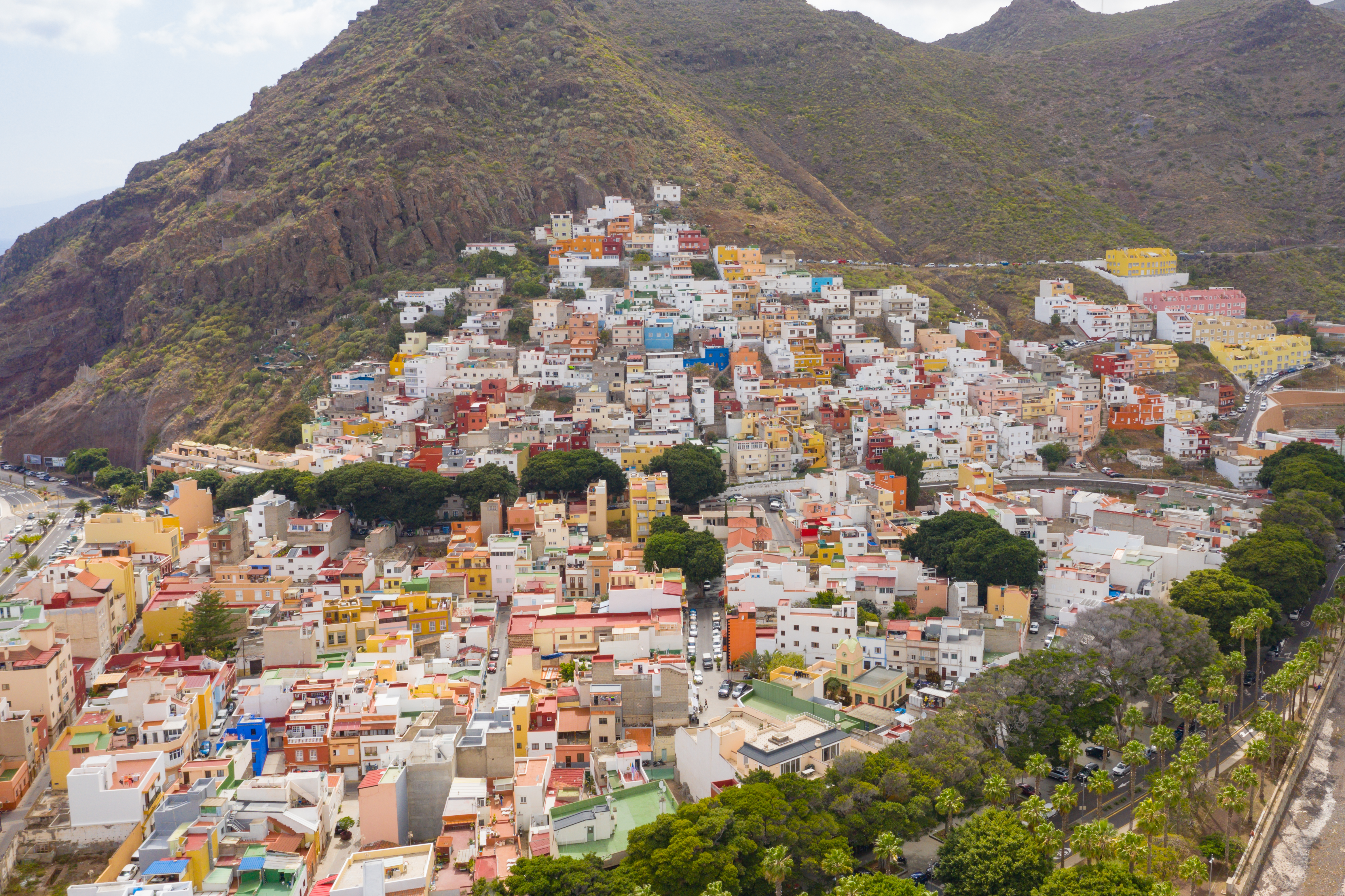 Tenerife